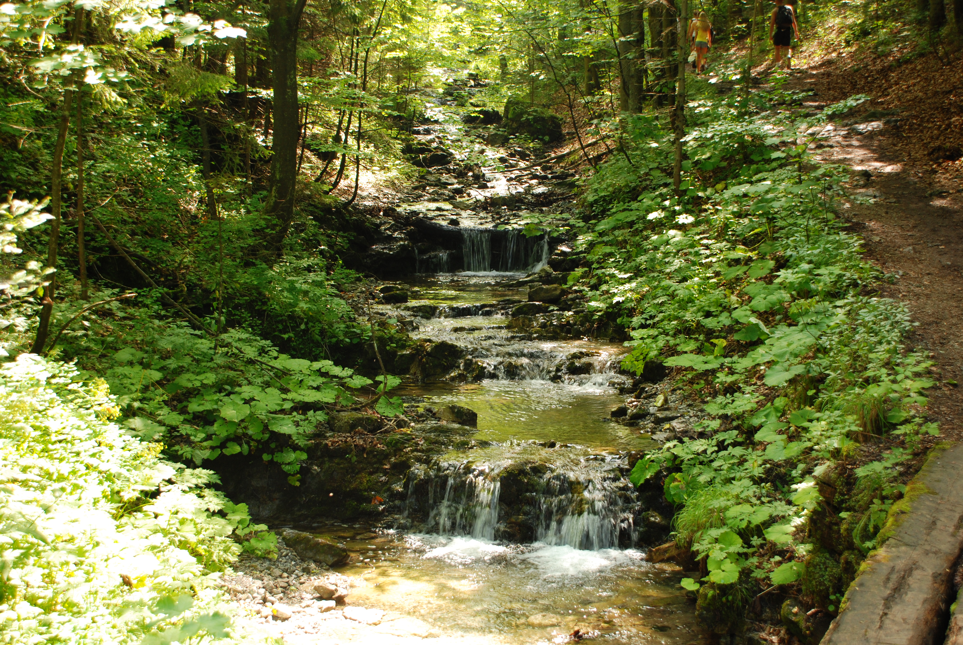 Potok zza Bramki